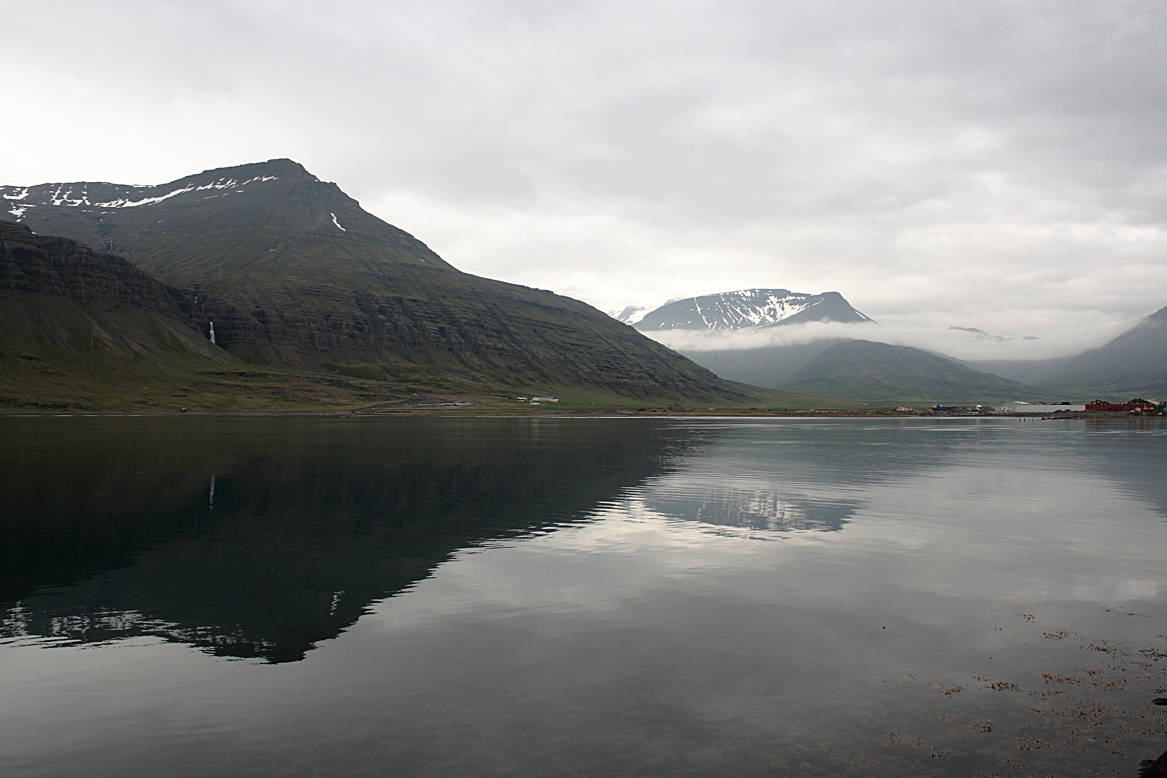 Reyðarfjörður